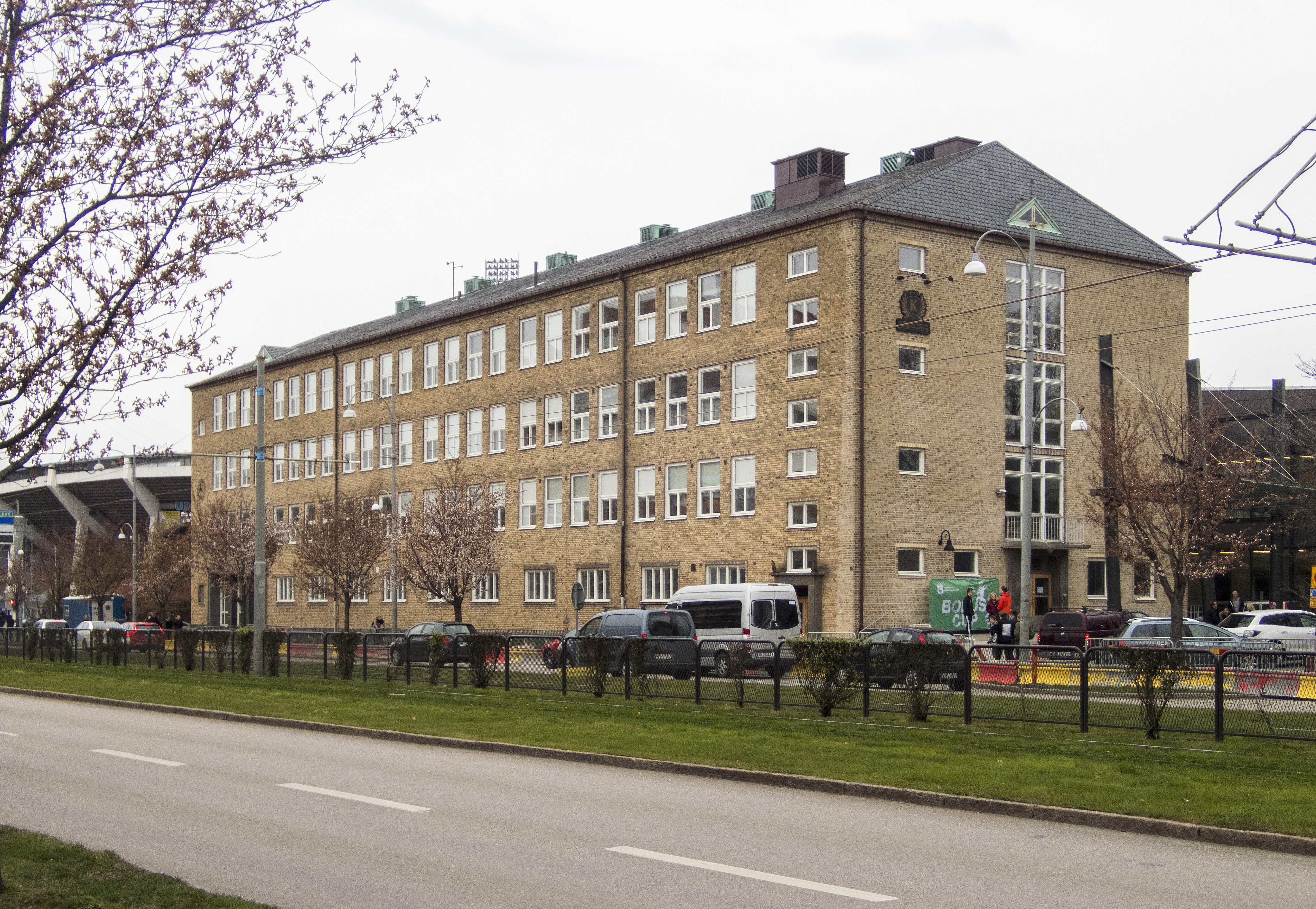 Katrinelundsgymnasiet, Skånegatan 14, Göteborg. Ursprungligen Göteborgs praktiska mellanskolor, byggår 1947, Arkitekt Axel Forssén